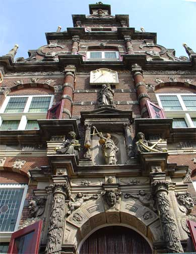 Voorgevels van het stadhuis van Bolsward